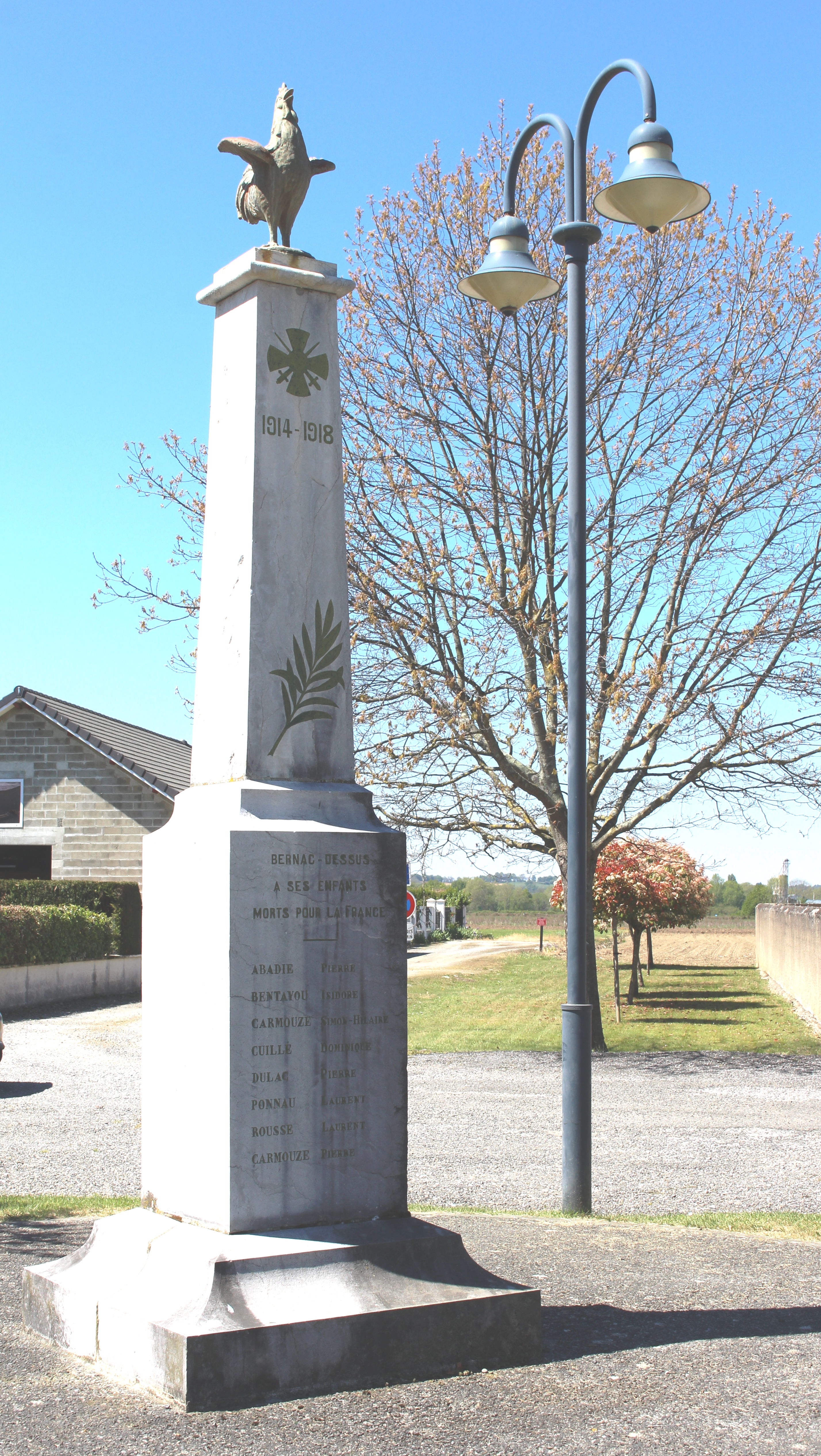 Monument aux morts de Bernac-Dessus (Hautes-Pyrénées)